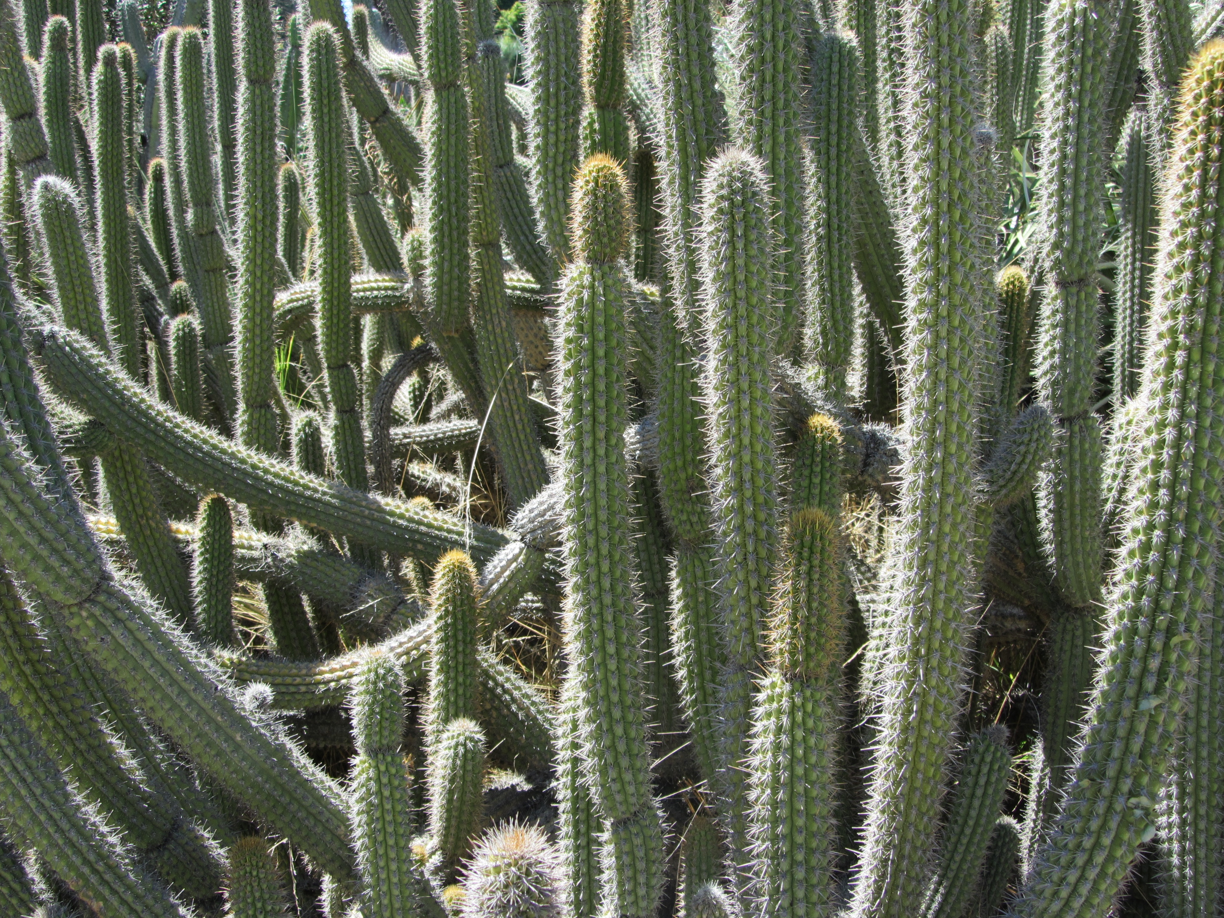 Cleistocactus clavicaulis